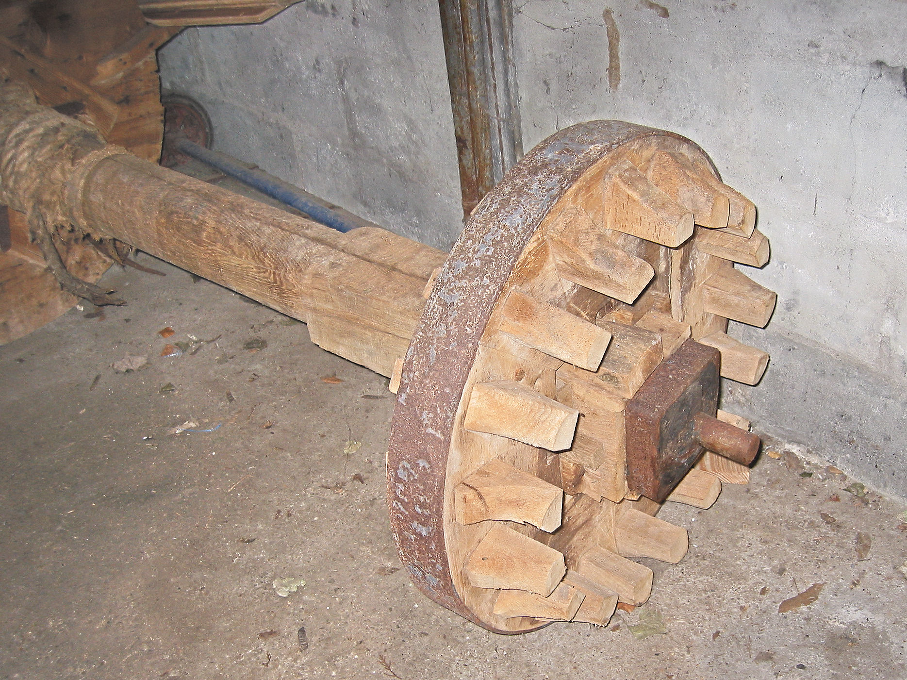 Kammenluiwiel van Concordia molen te Ede eind mei 2007